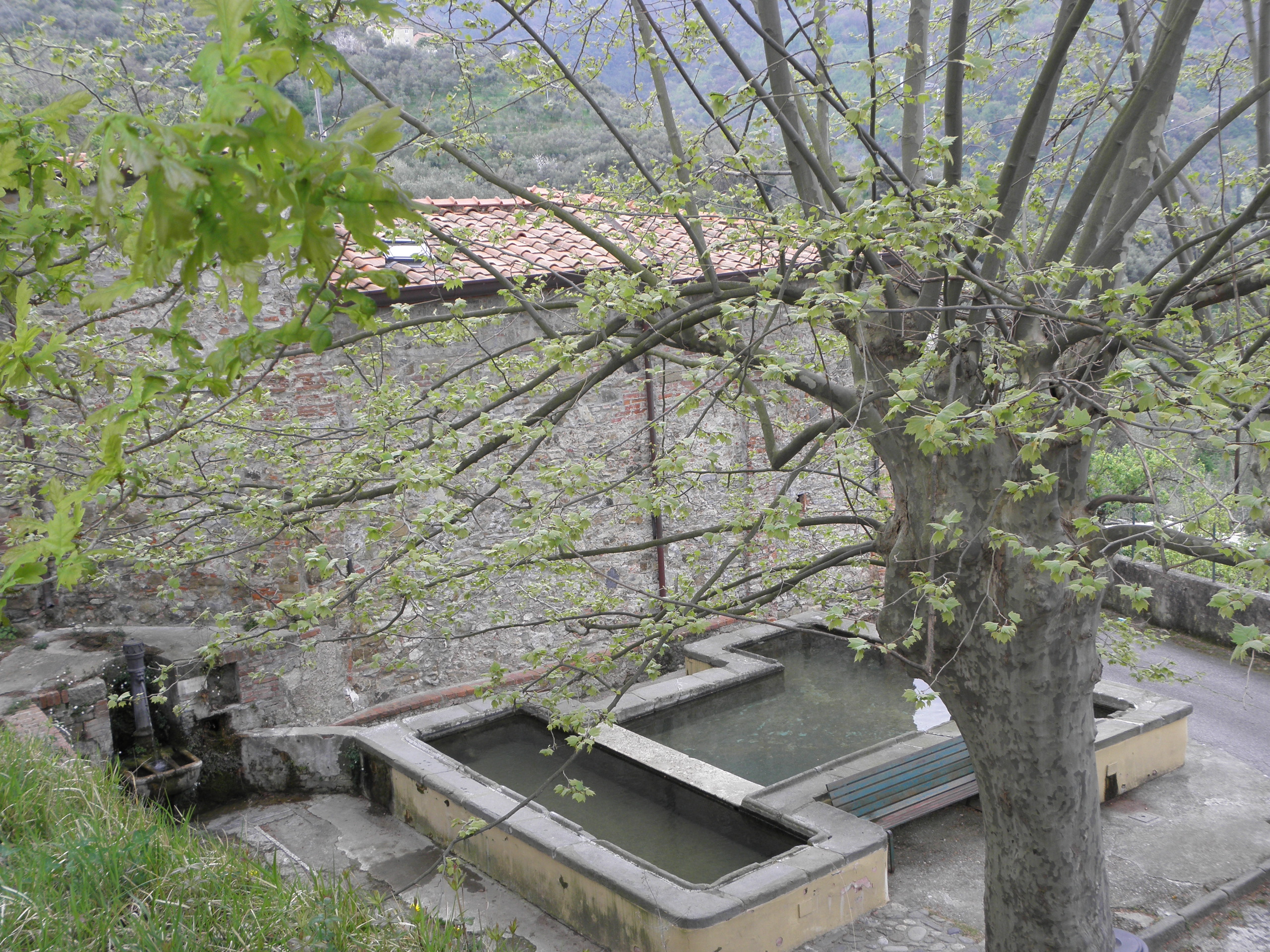 Lavatoi pubblici This is a photo of a monument which is part of cultural heritage of Italy.